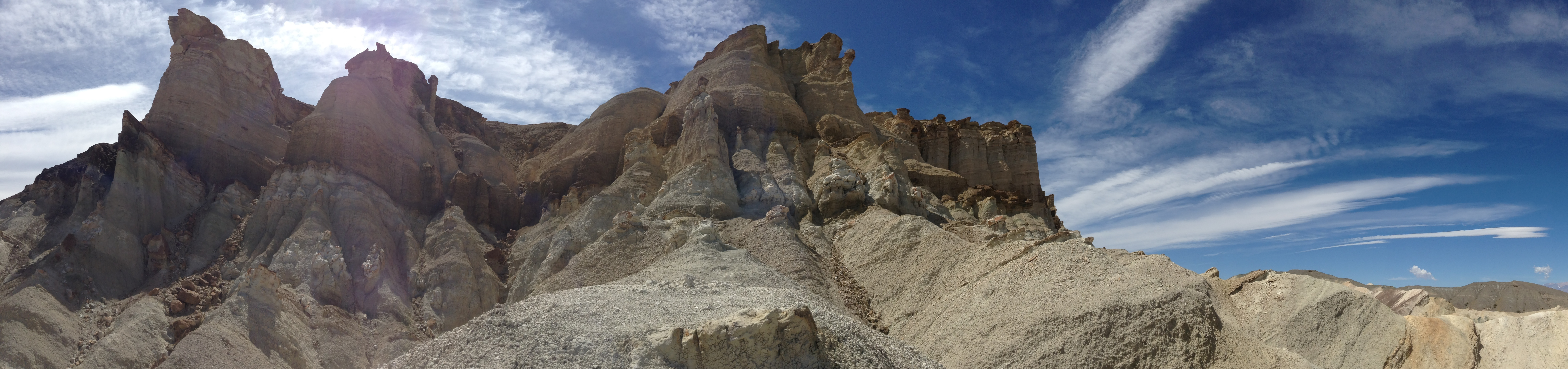 Panorámica del Cerro Alcázar desde su base. Precordillera de los Andes. San Juán, Argentina.